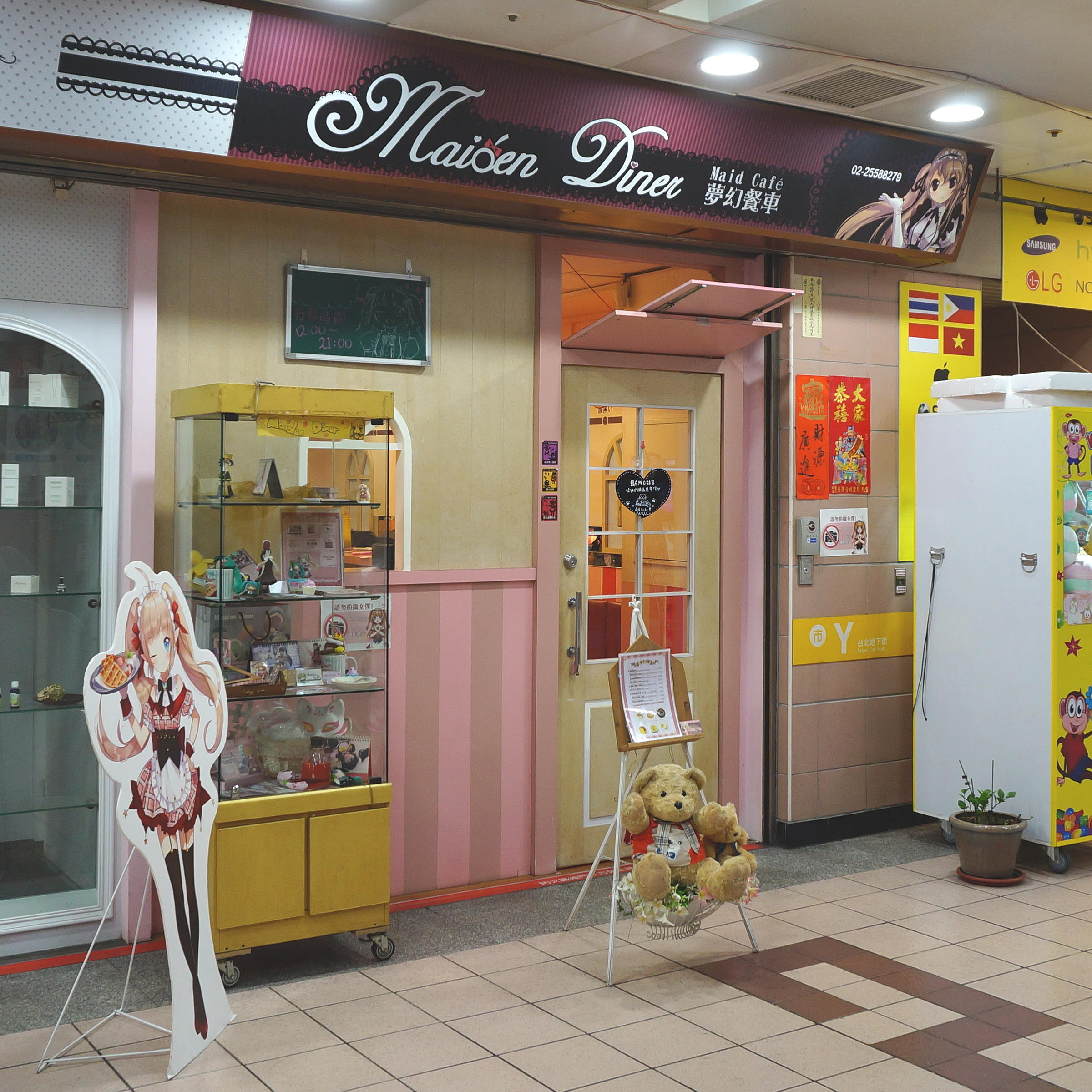 夢幻餐車女僕喫茶，位於台北地下街11號店。